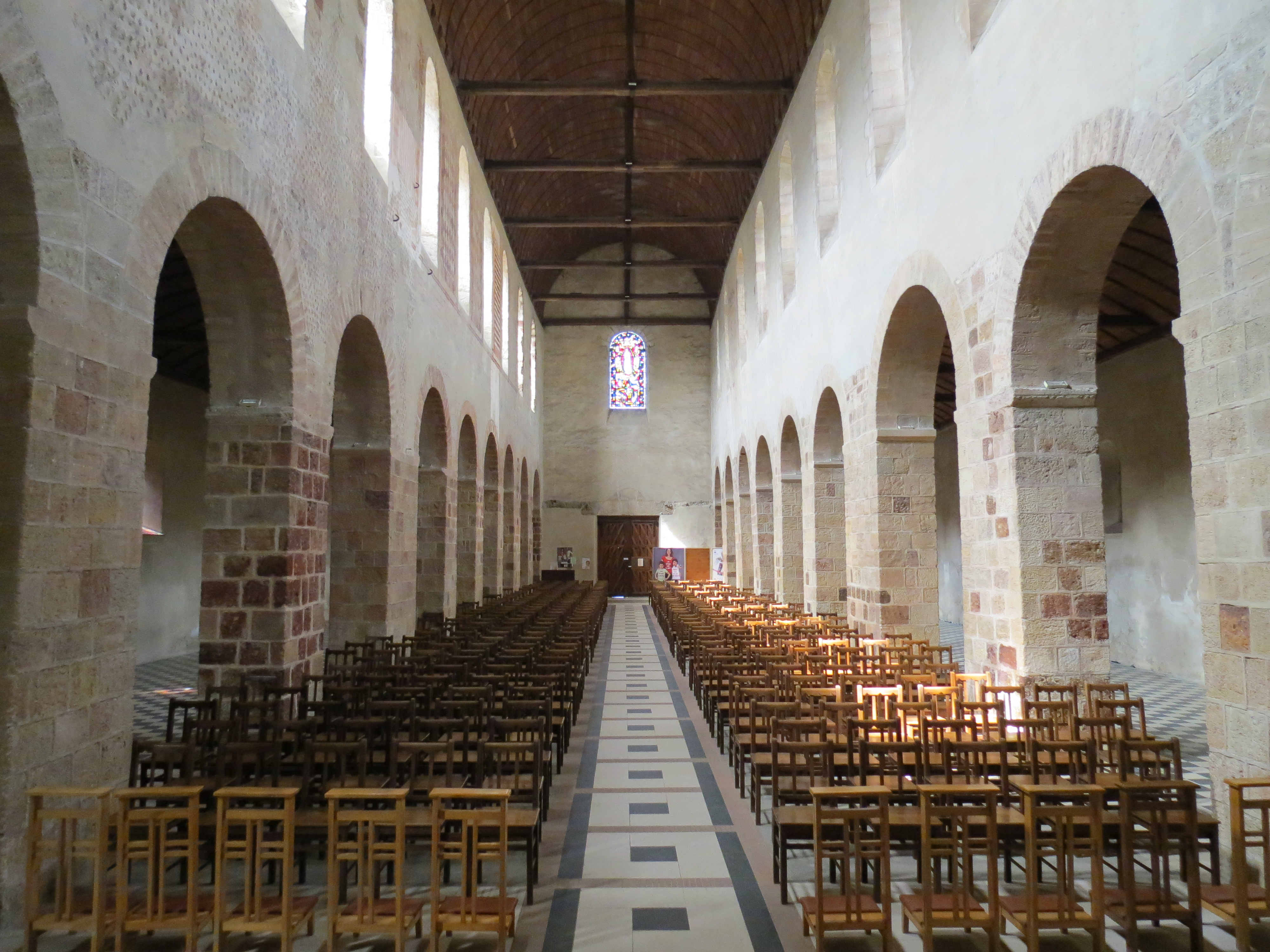 Vaisseau principal de l'église Saint-Jean-Baptiste de Château-Gontier (Mayenne) vu de la croisée du transept.